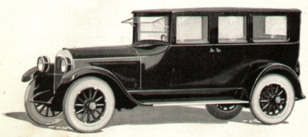 Paige Auto, from 1922 magazine ad